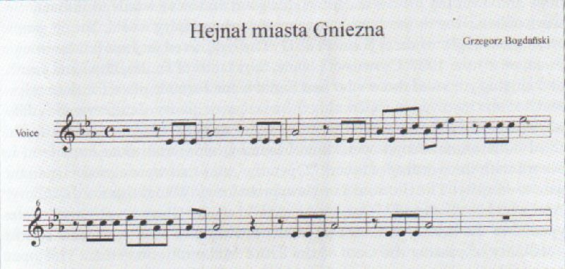 Zapis nutowy hejnału